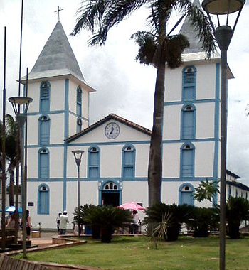 Igreja Matriz de Trindade, em Trindade, Goiás.